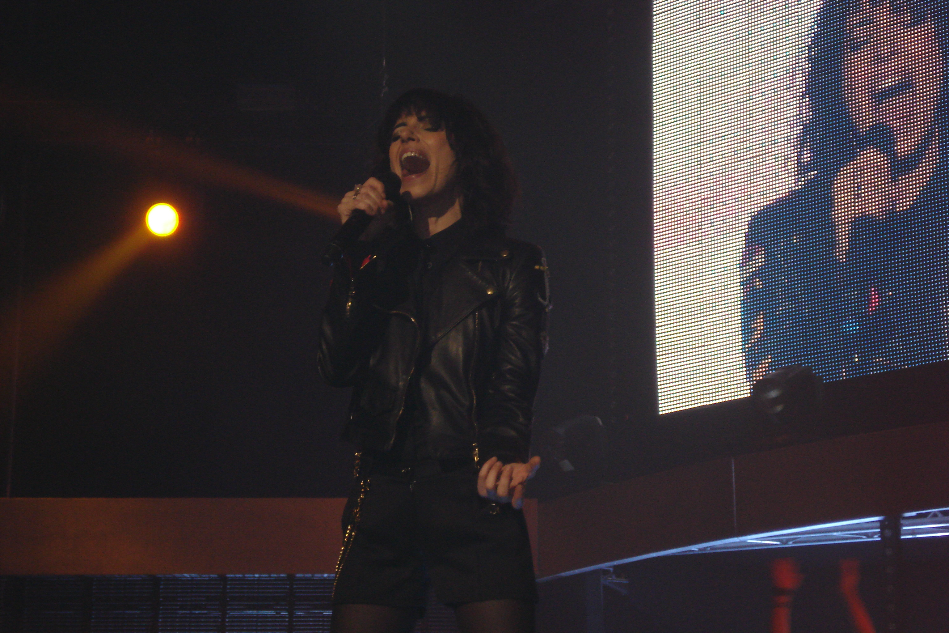 Giorgia durante l'Anteprima del Dietro le Apparenze Tour al Palalottomatica di Roma il 21 Gennaio 2012